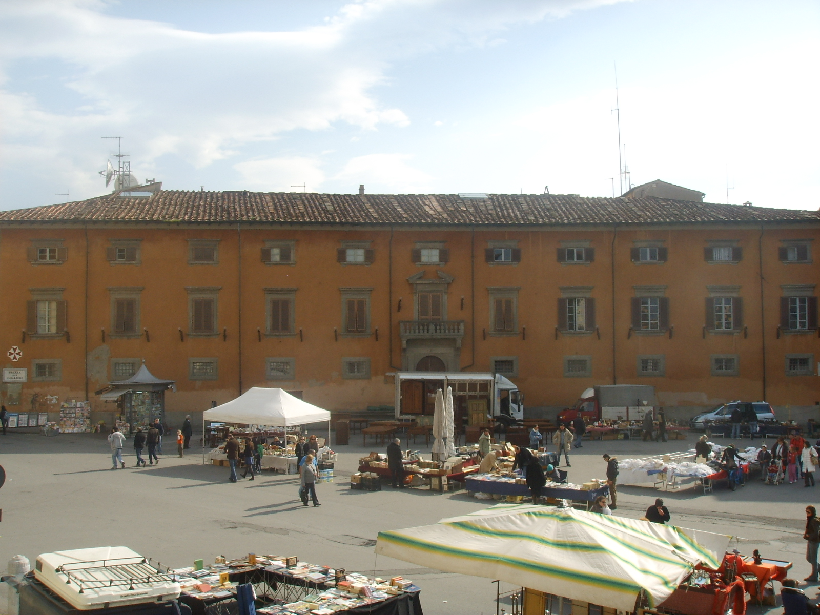 Canonica_(Pisa)